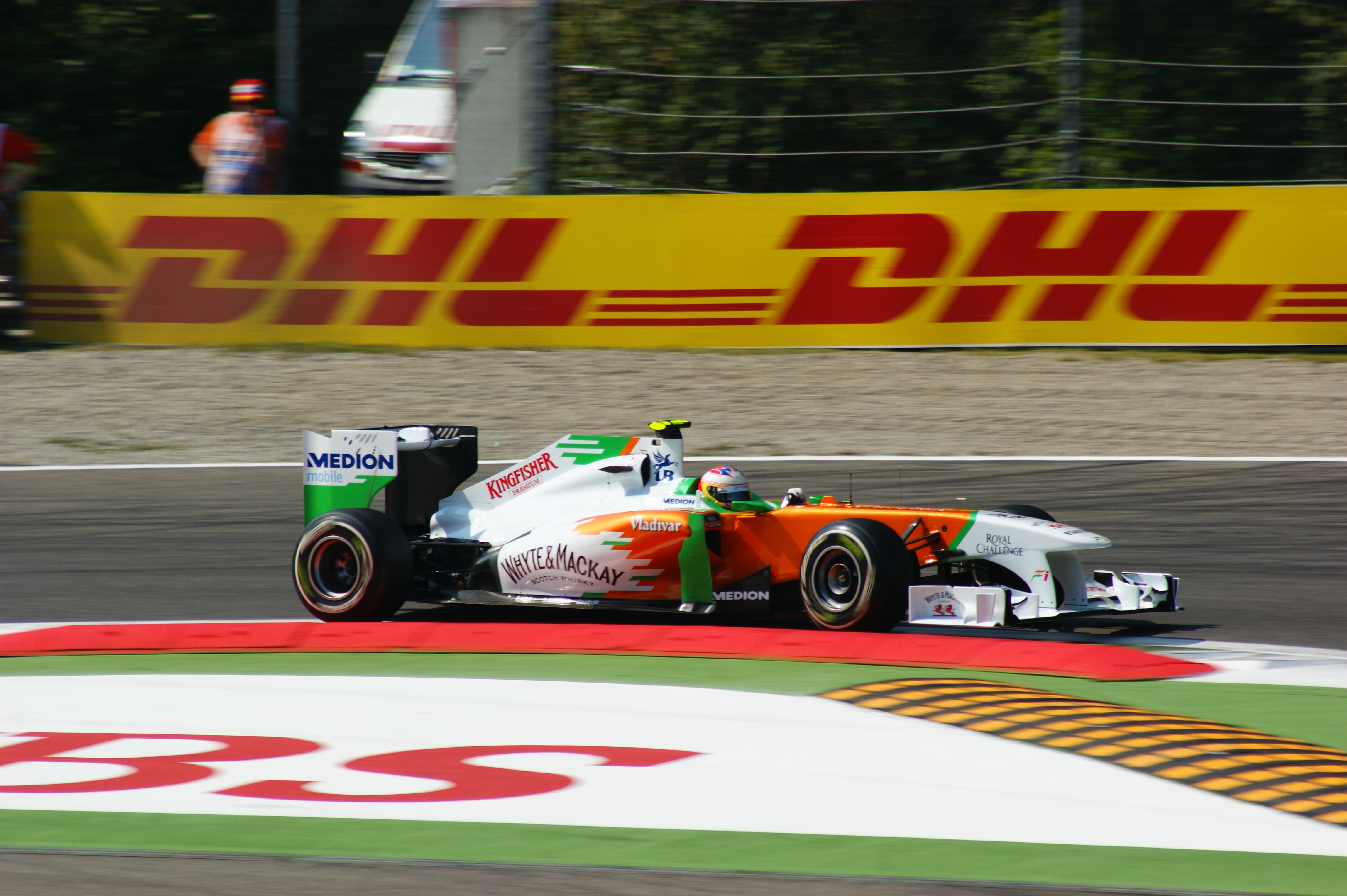 Paul Di Resta alla variante della roggia Monza 2011